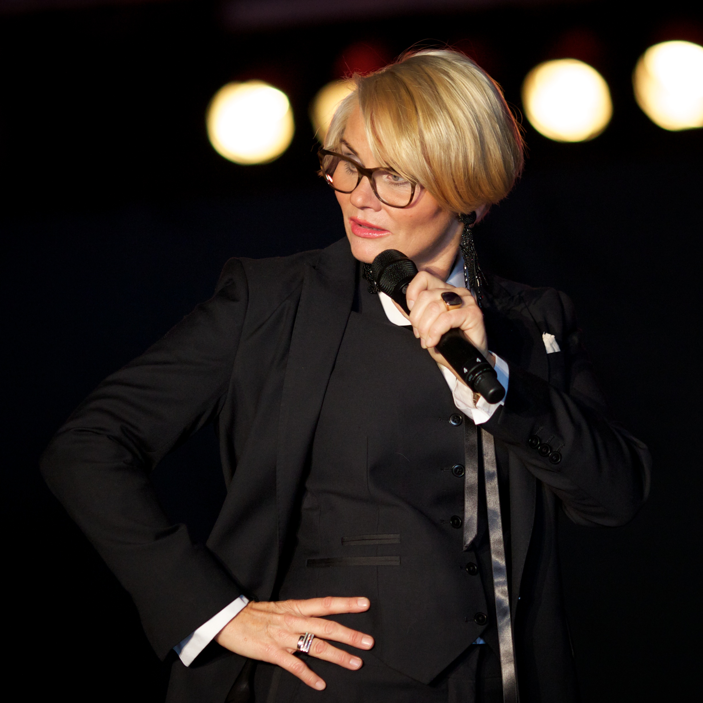 Mia Gundersen at fashion show, Handelsstevnet Skien